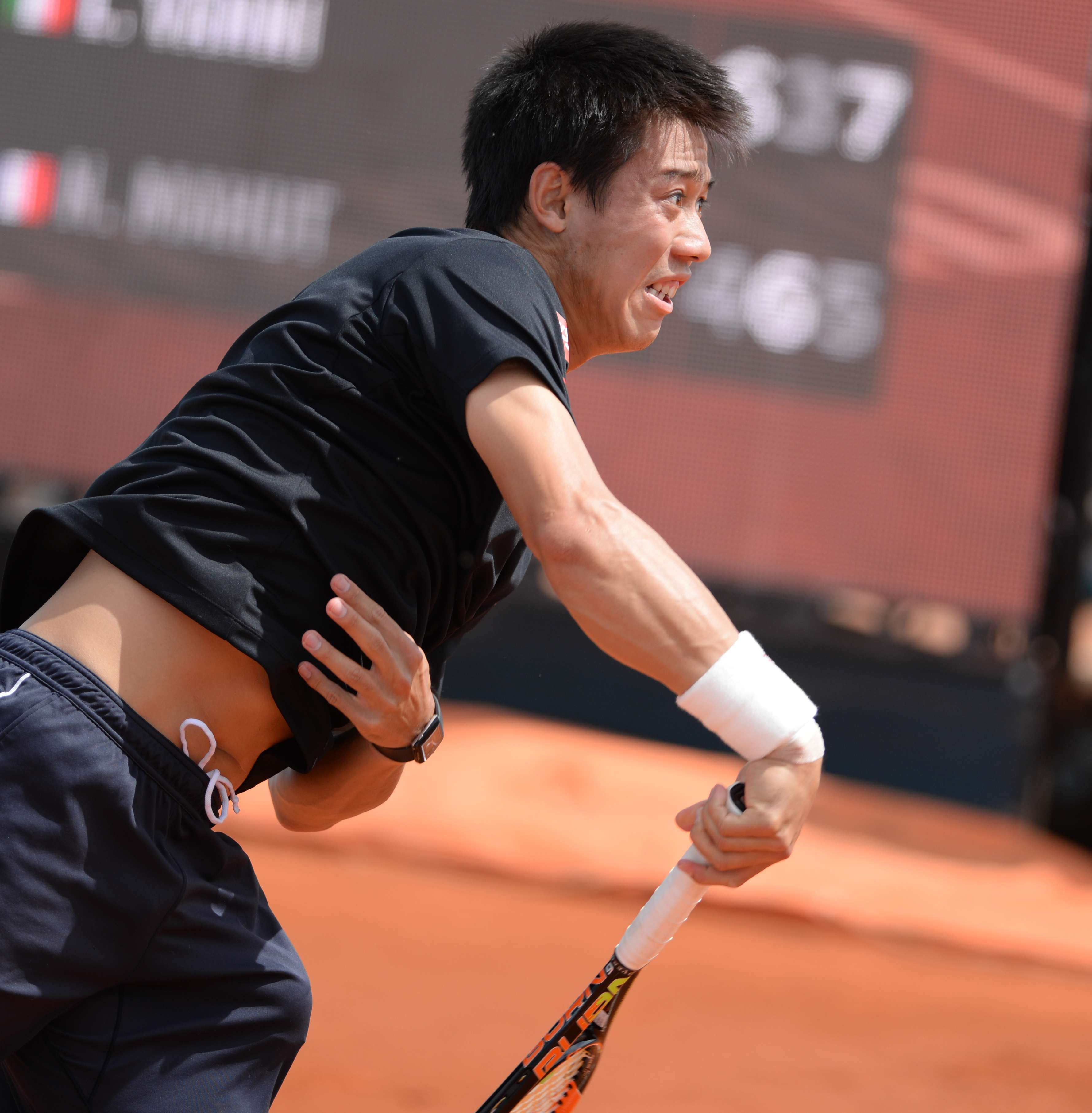 Kei Nishikori